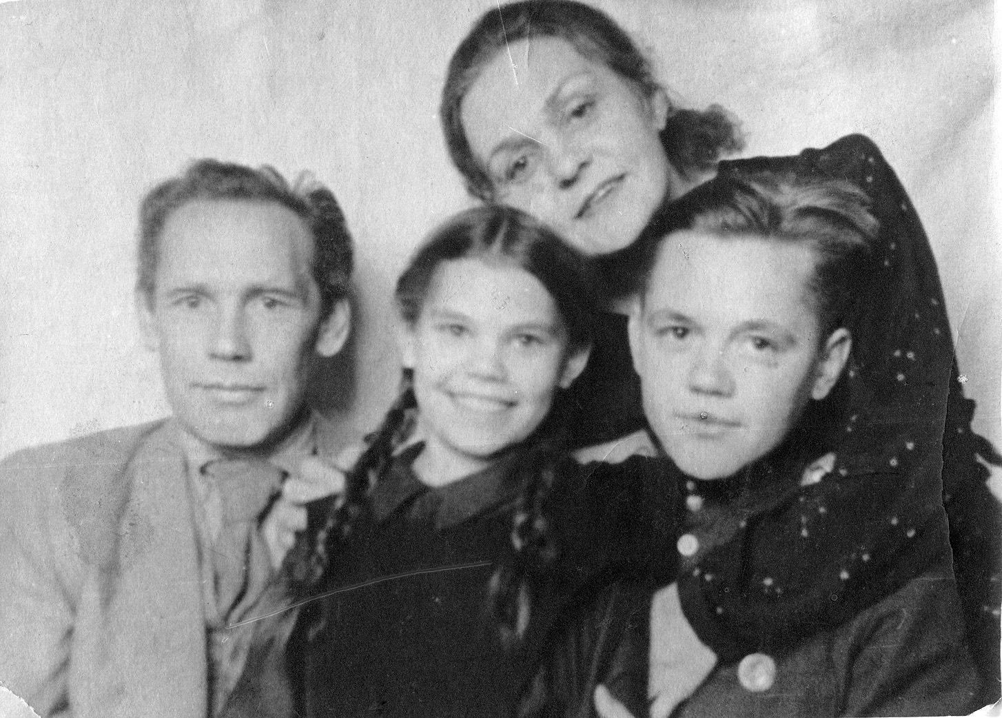 Артисты Людмила Франжоли и Николай Кудрявцев с детьми. Фото ок. 1940 г. Пошехонье ?